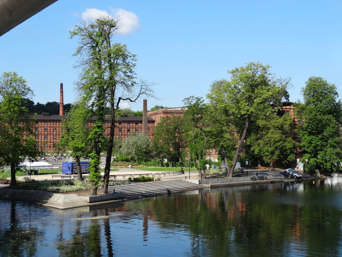 Nabrzeże północne Wyspy Młyńskiej w Bydgoszczy